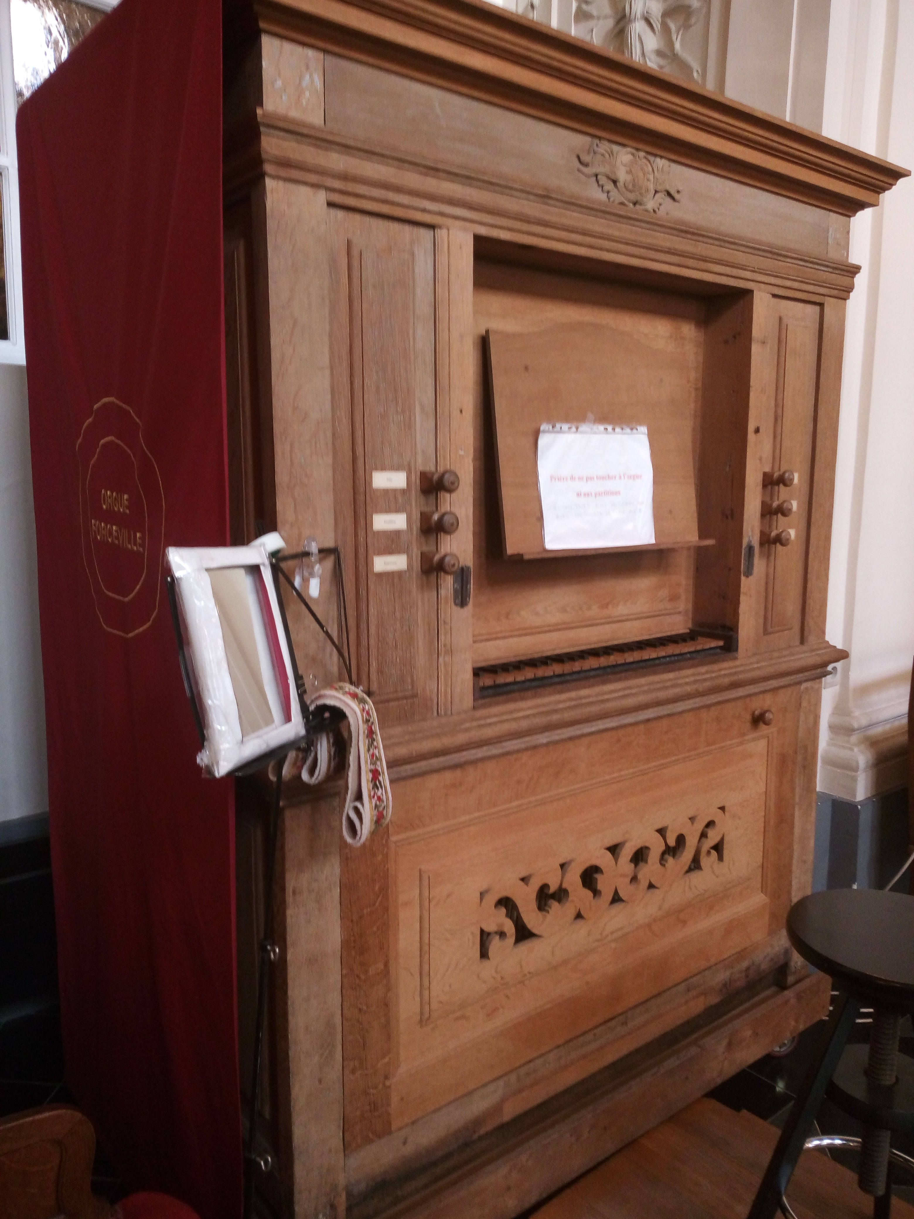 Orgue de 1699 de Forceville, dans l'église protestante de Bruxelles - musée